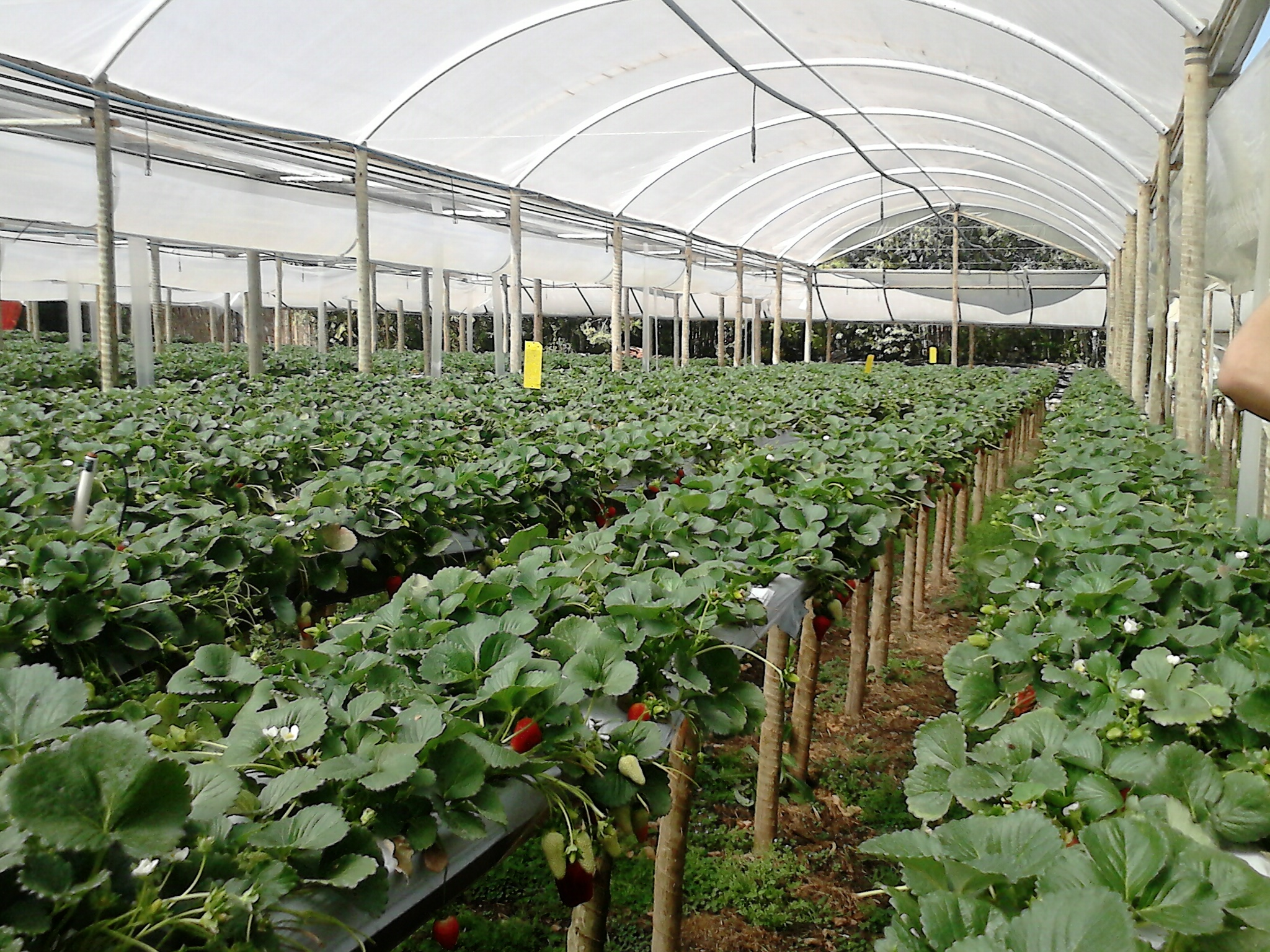 Cultivo de morango no município de Estiva.